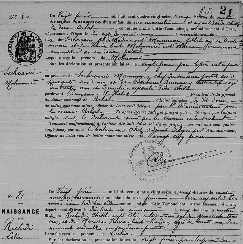 Aïn Témouchent, Algérie. Actes de naissance de 1896, enregistrés sur un formulaire indiquant les prescriptions de la loi du 23 mars 1882 constituant l'état civil des musulmans d'Algérie, article 18.